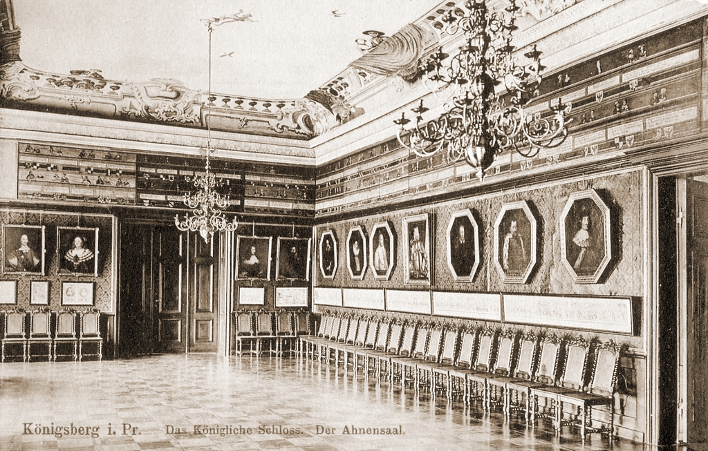 Unfriedbau Ahnensaal Königsberger Schloss